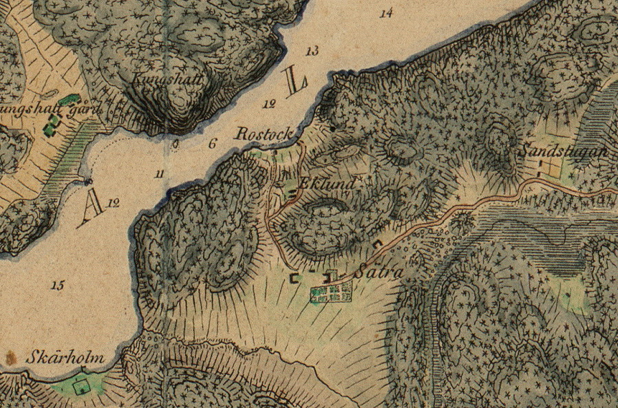 Del av W.M. Carpelan karta över Stockholm med omgivning visande Sätra och Skärholmen